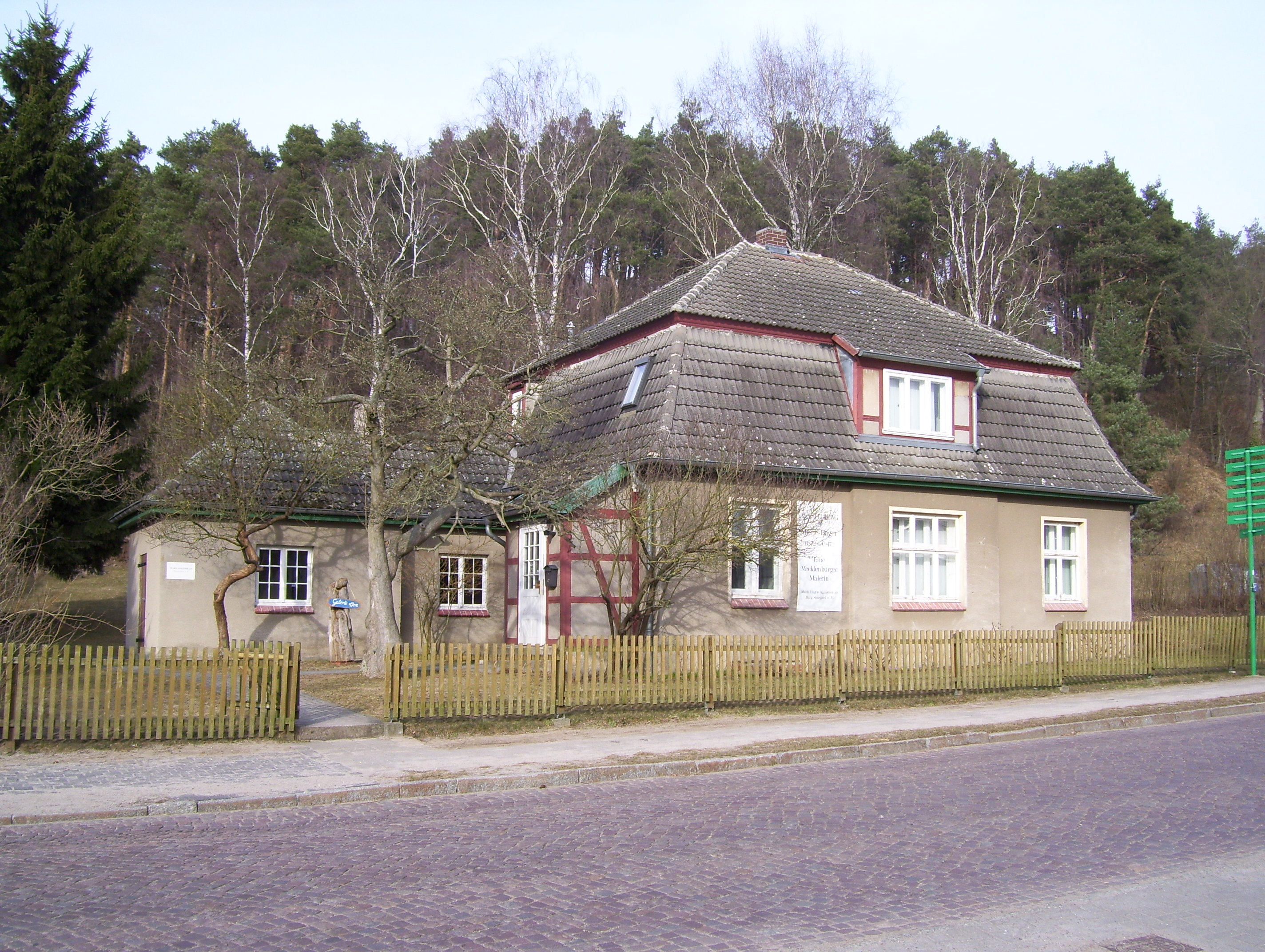 Marie-Hager-Haus in Burg Stargard